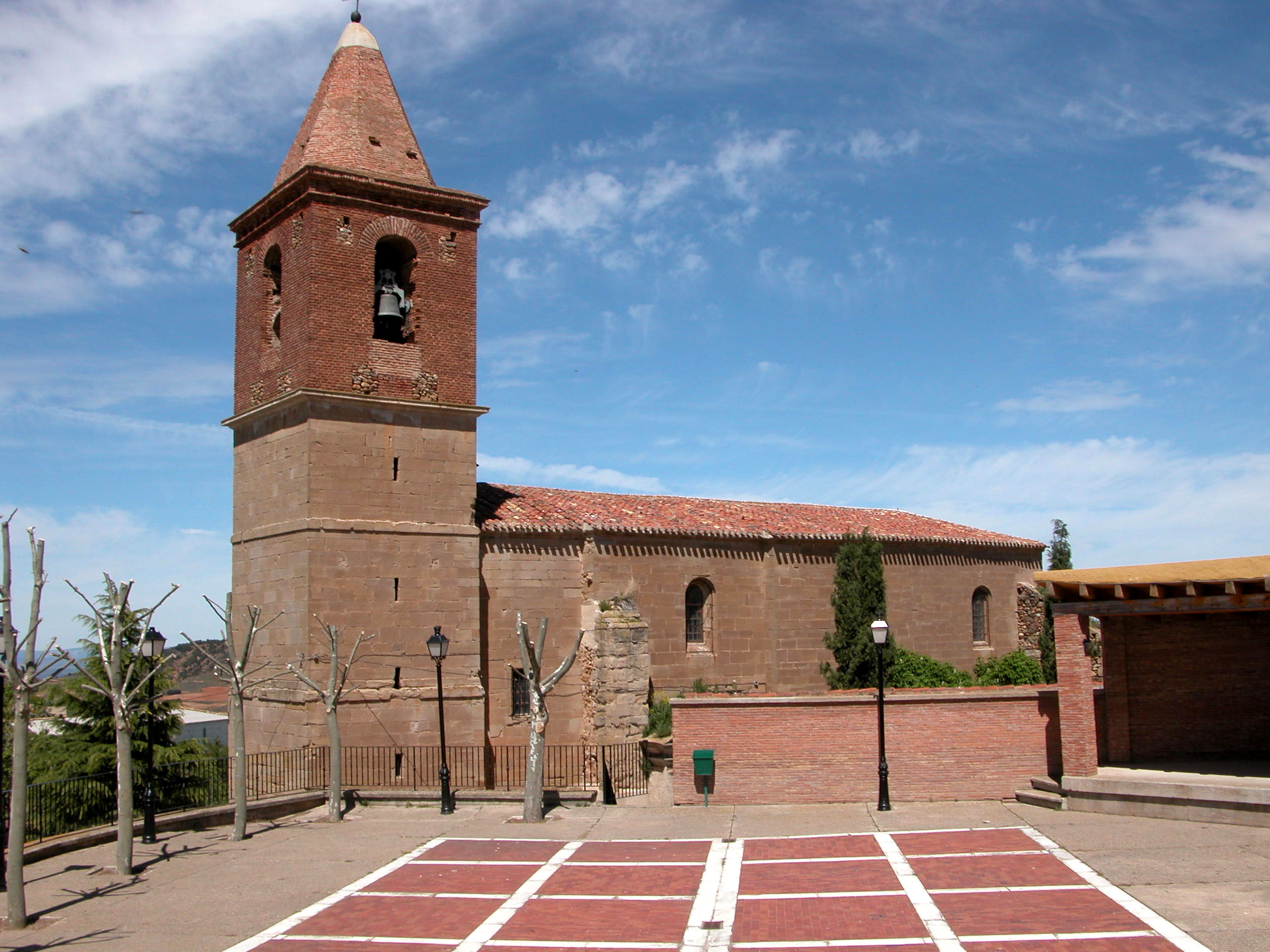 Uglesia de Santa Lucía en Ocón (La Rioja - España)